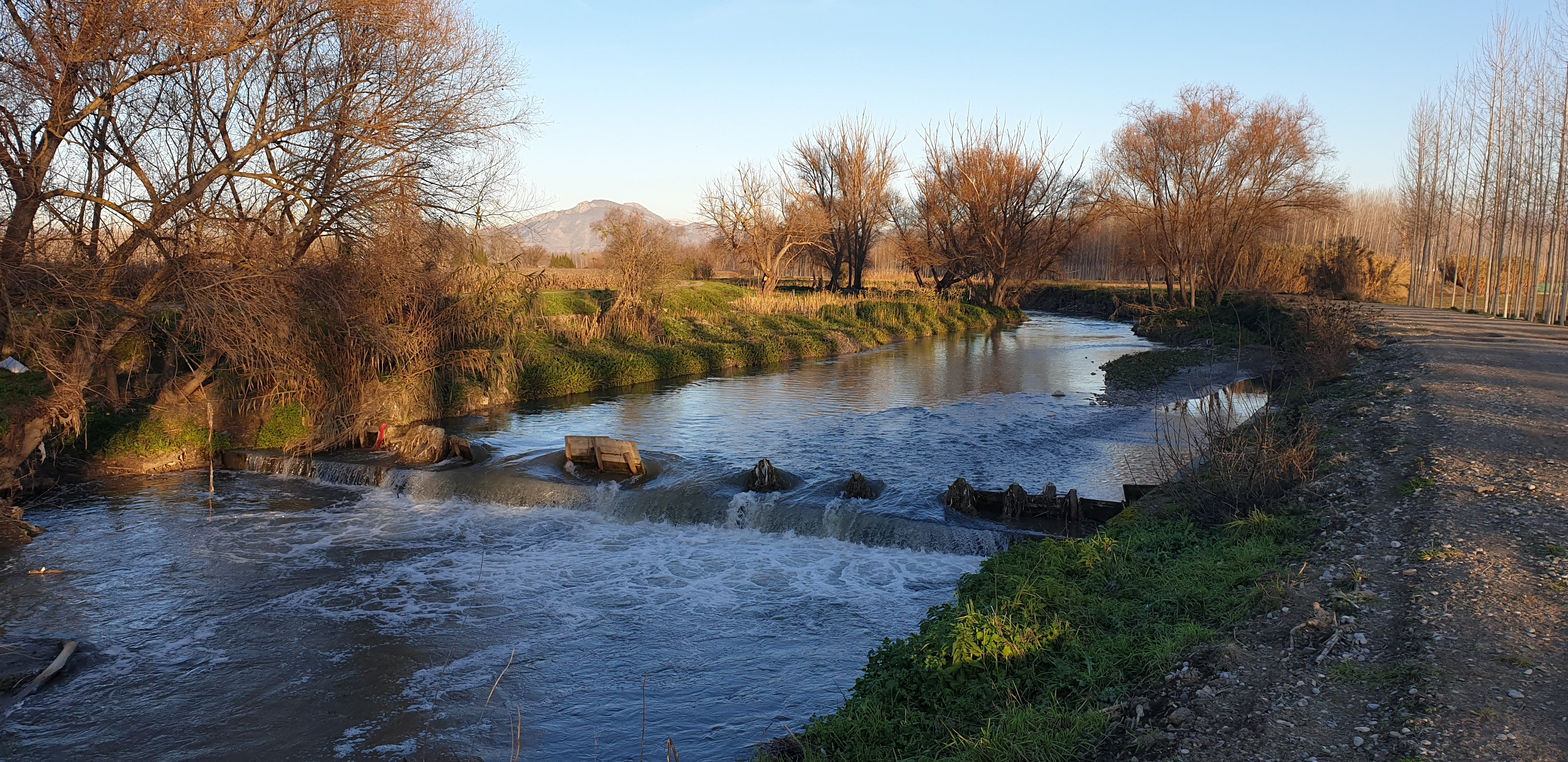 Pequeño salto del río Genil en el municipio de Fuente Vaqueros (Granada, España), cerca de Cijuela.